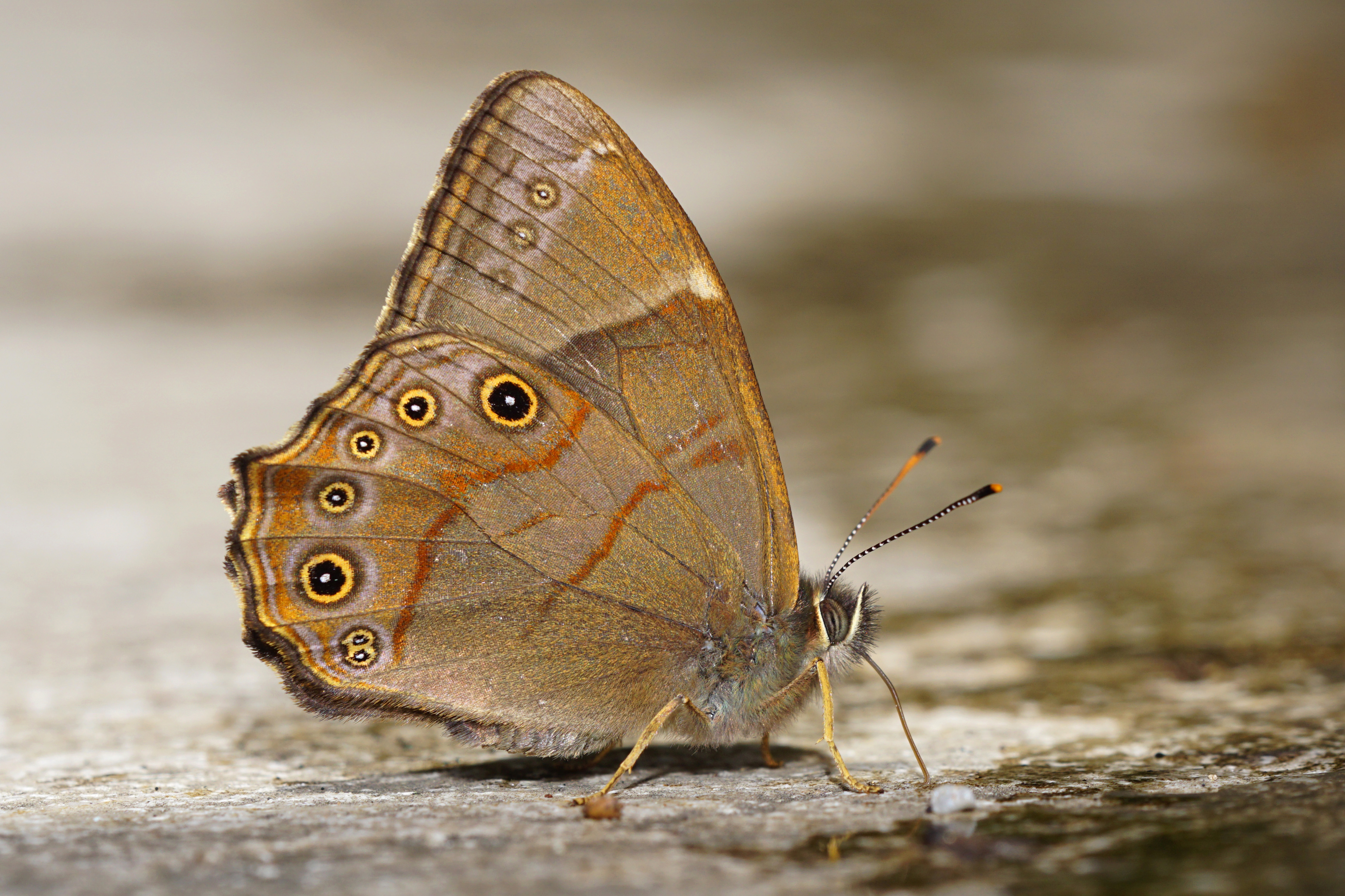 深山黛眼蝶 Lethe insana formosana